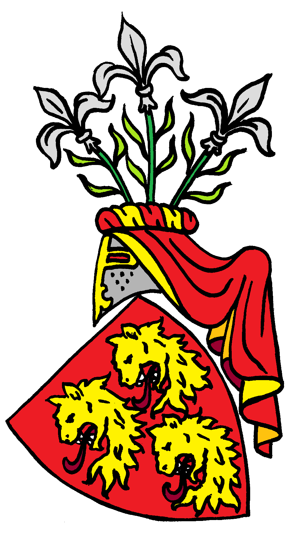 Stammwappen derer von Lode, pommerscher Adel